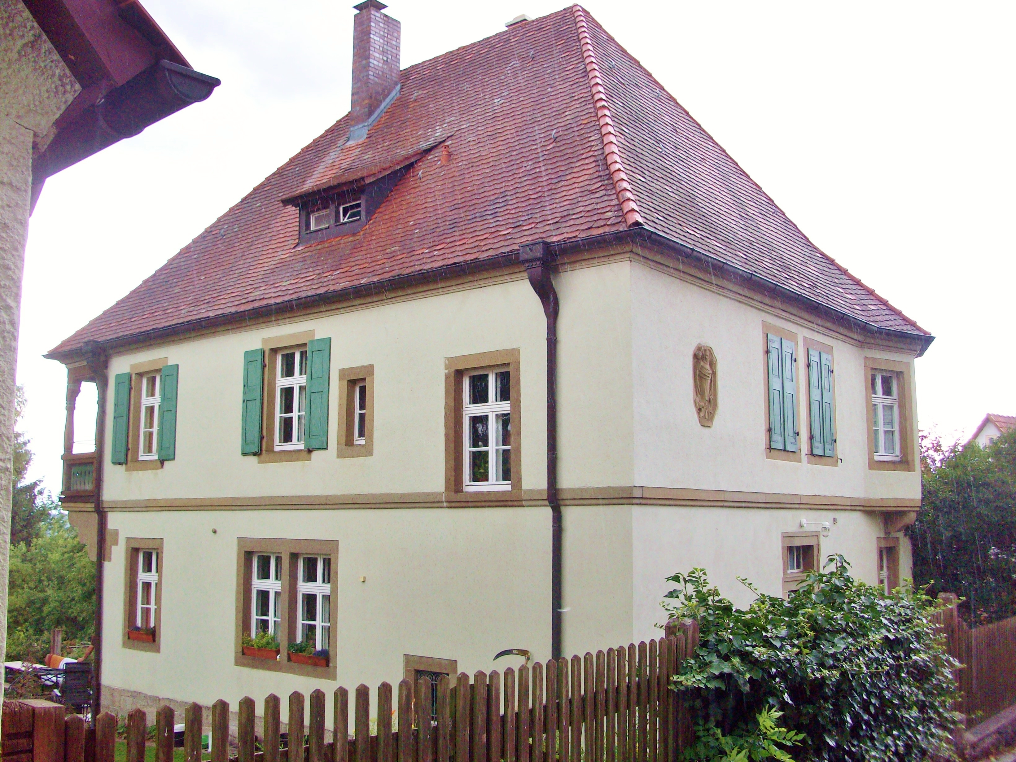 Fladungen in der Rhön: Rüdenschwinden: Pfarrhaus, Wendelstraße 13